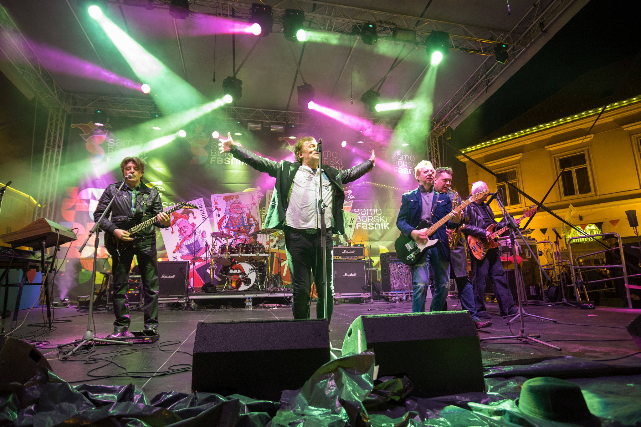 Prljavo kazalište Sambor 2017